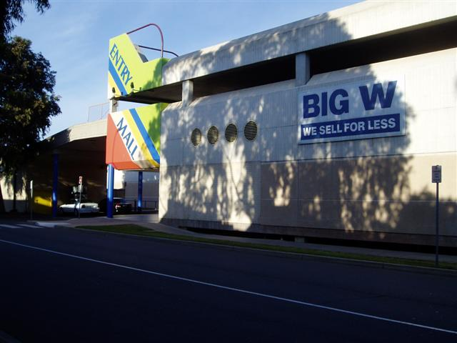 Centro Arndale Shopping Centre entrance to Big W.